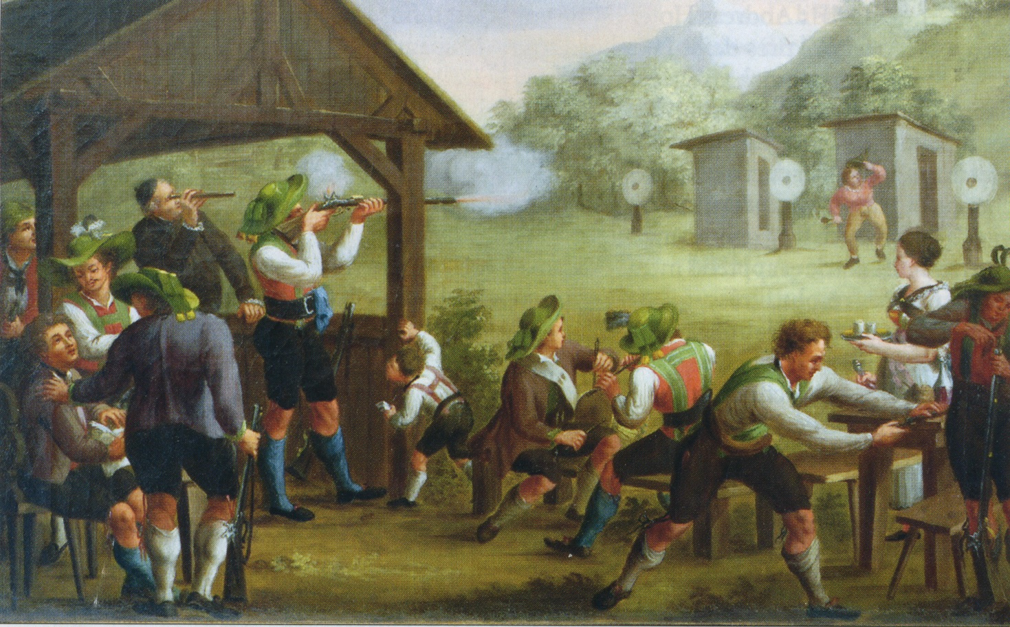 Tirailleurs (Schützen) du Tyrol XVIIIe-XIXe siècle